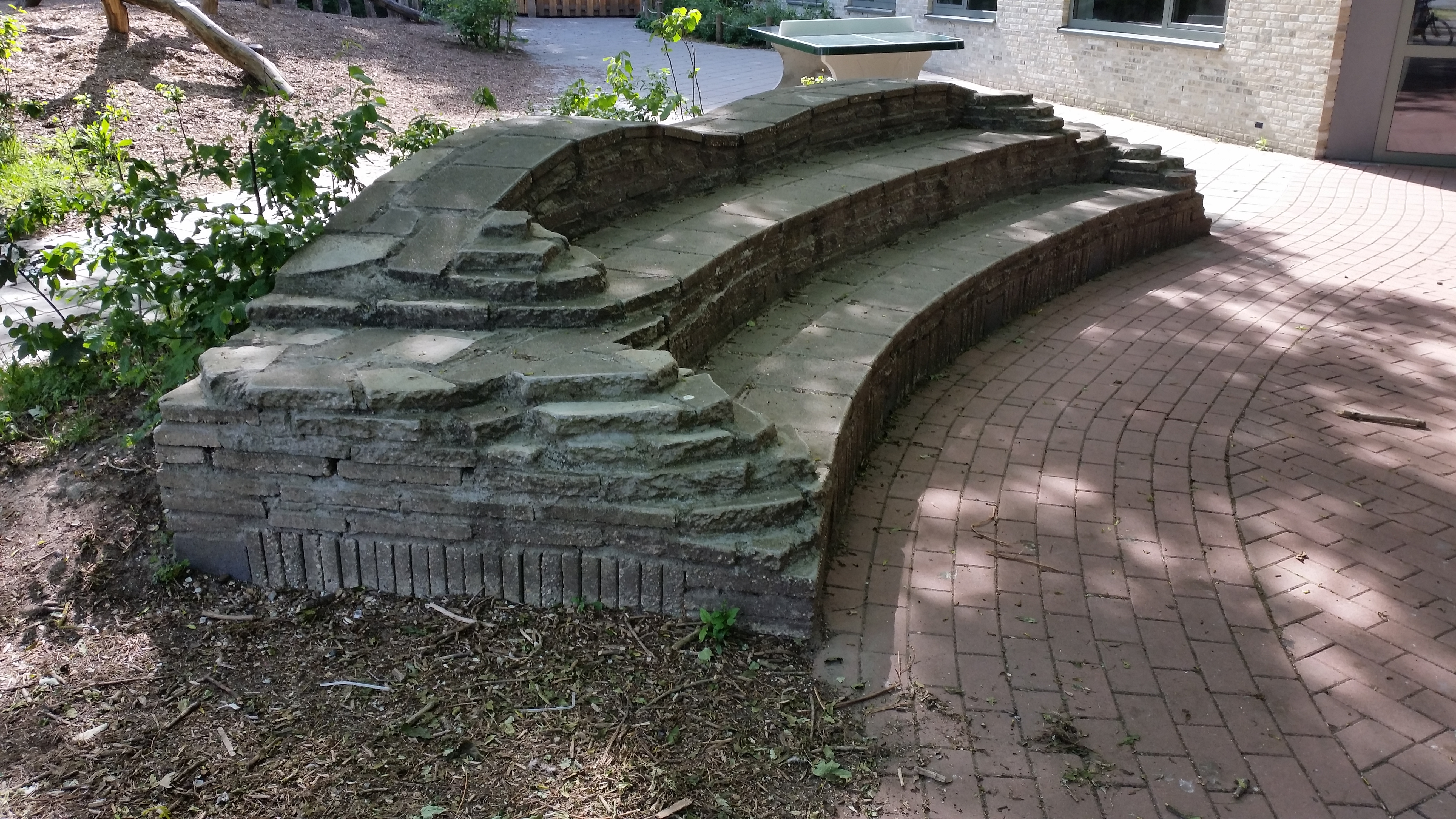 Impressie van Peelstraat, Amsterdanm-Zuid (mei 2020)